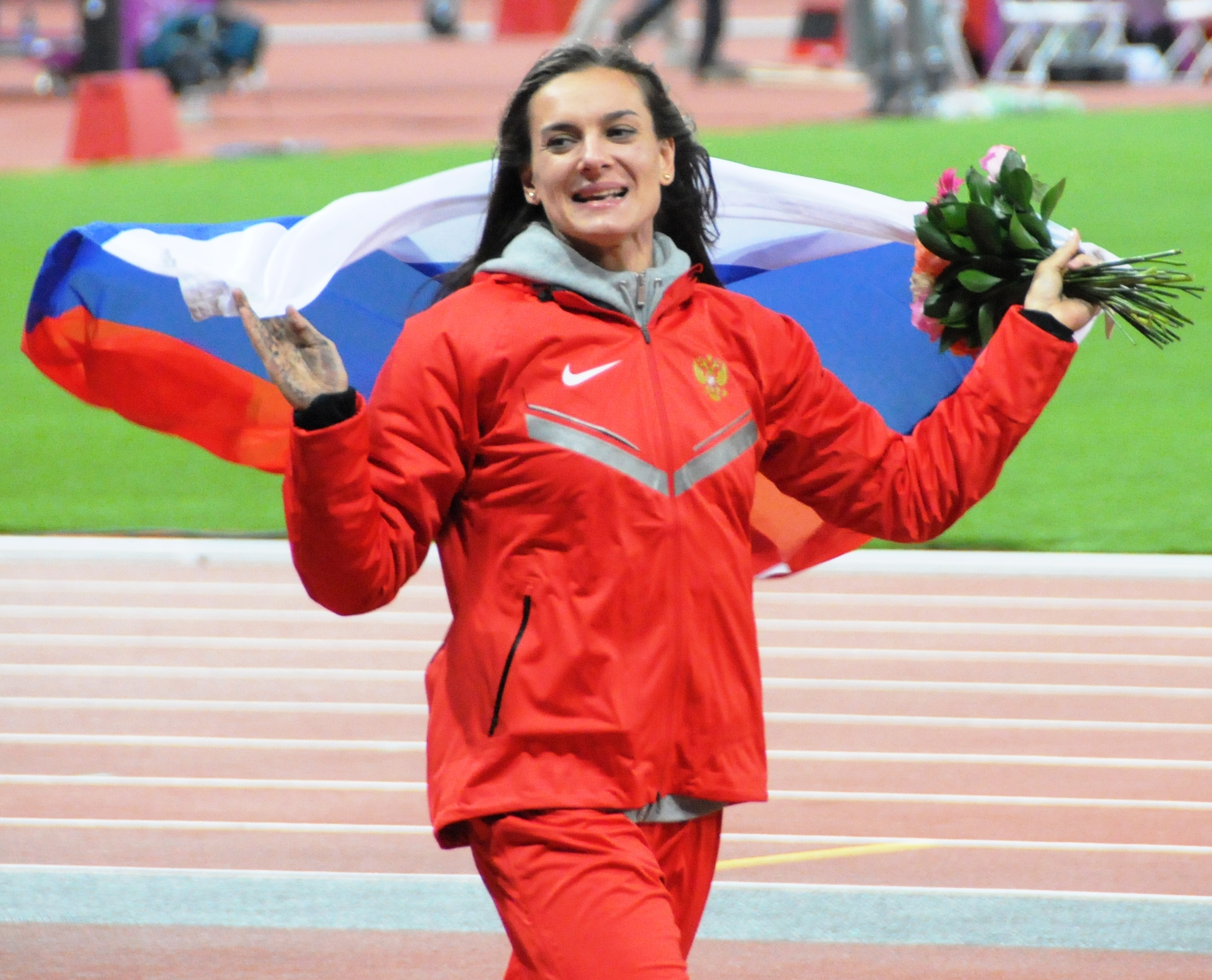 La russe Elena Isinbaeva médaille de bronze olympique du saut à la perche à Londres 2012